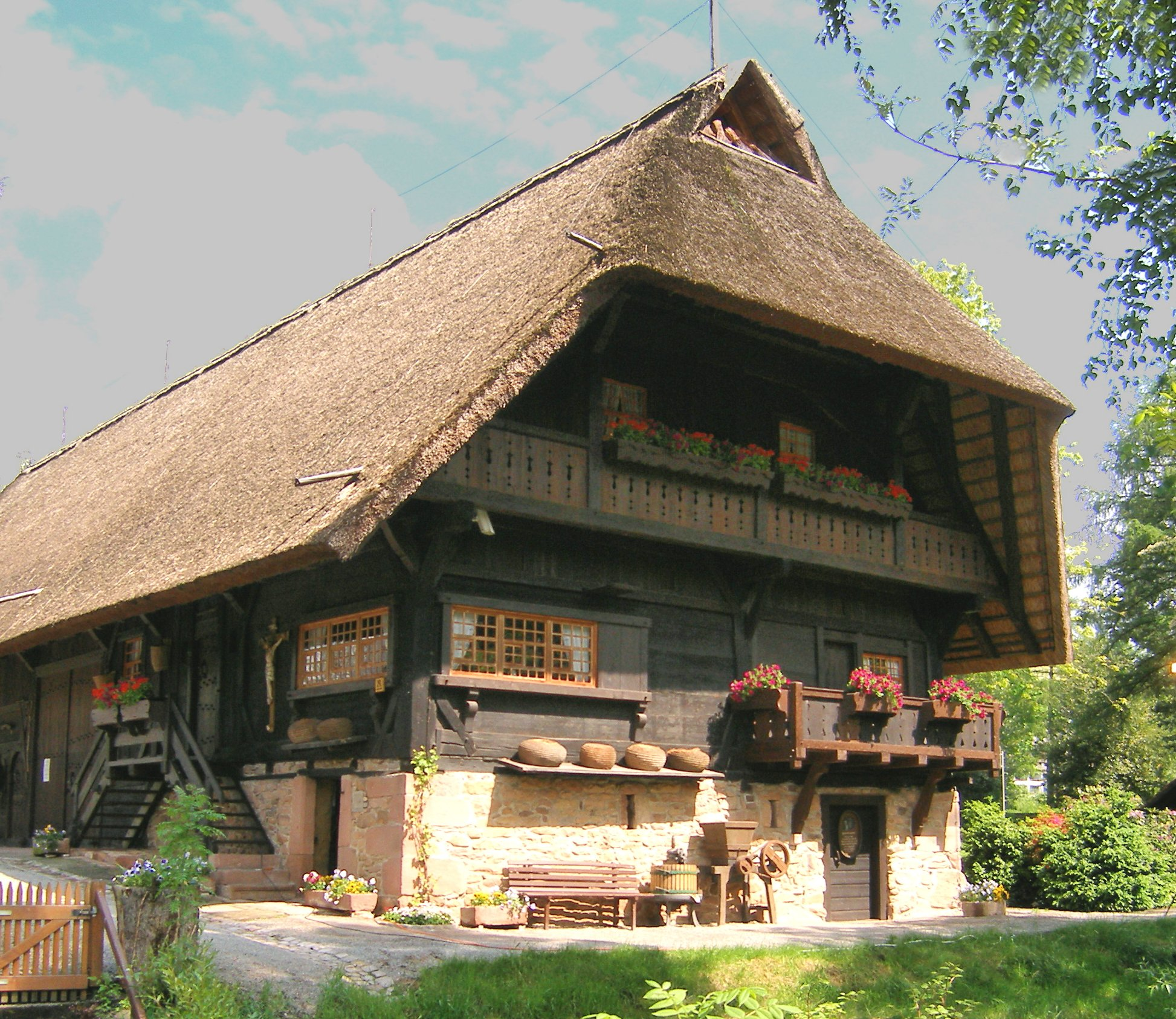 Fürstenberger Hof Museum, Zell am Harmersbach